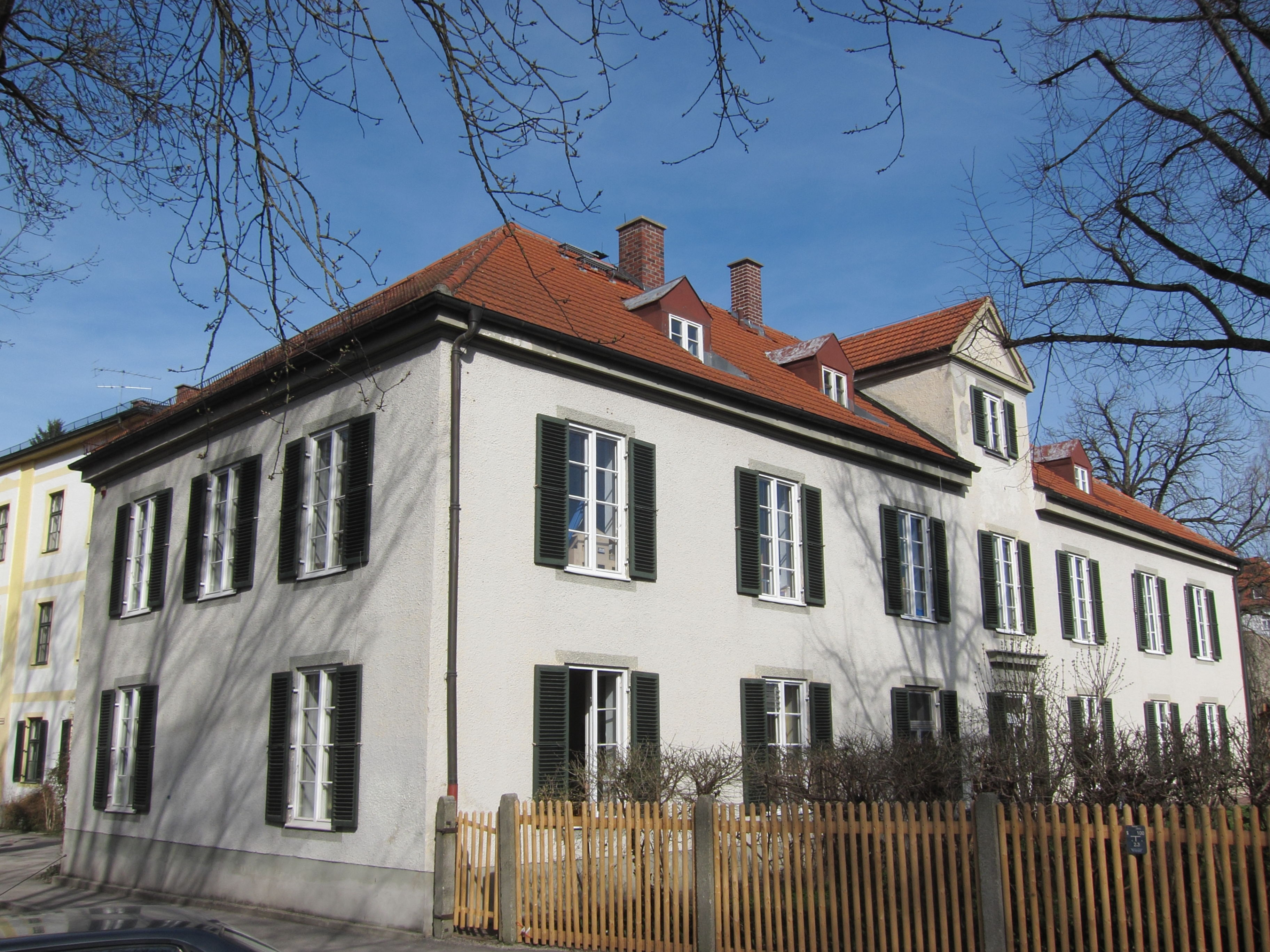 Am Klostergarten 15; Ehem. Schulhaus, dann Kleinkinderbewahranstalt, klassizierend, im Kern 1859, 1948–49 durch Bernhard Borst umgestaltet.